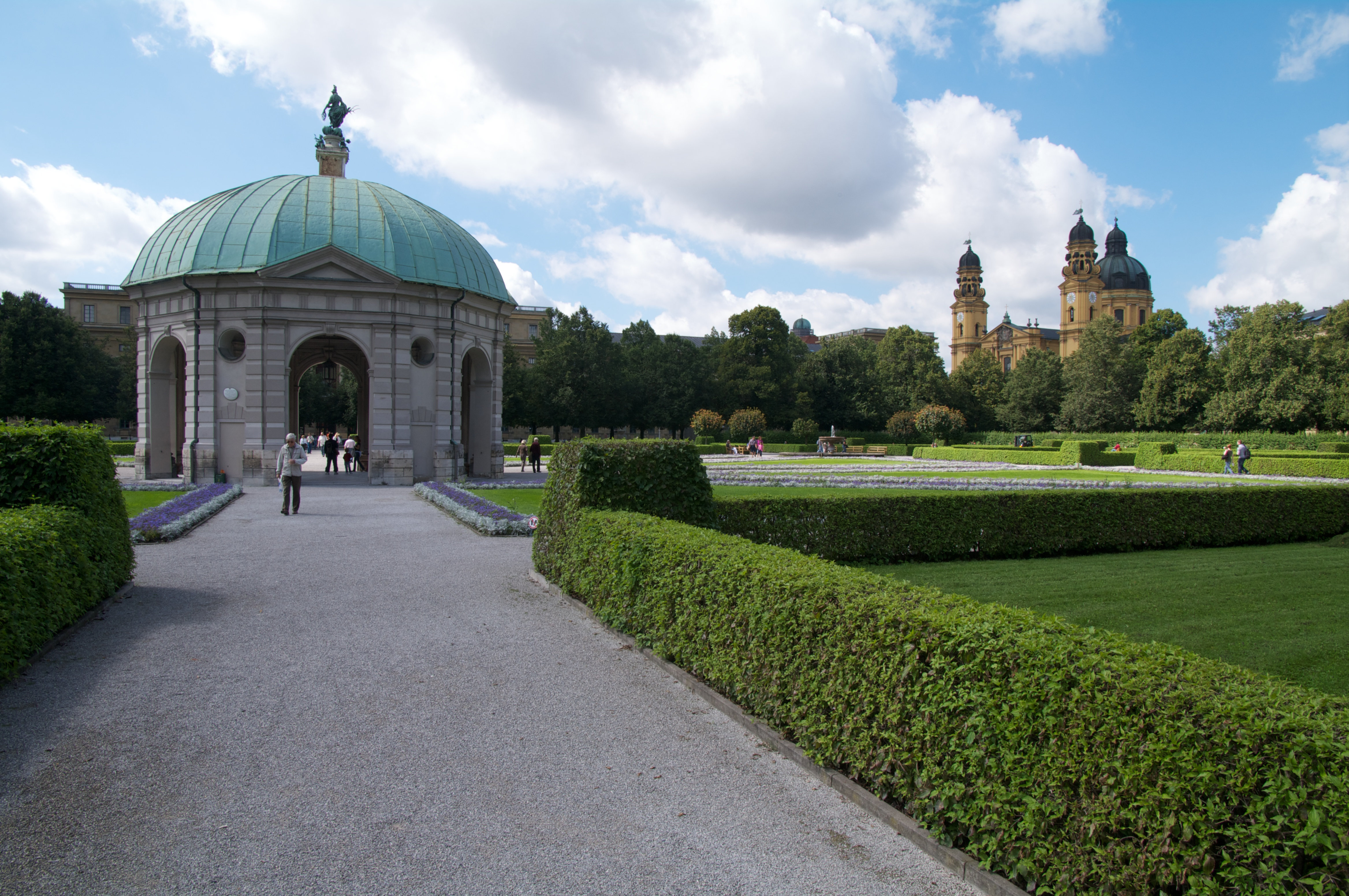 Hofgarten München